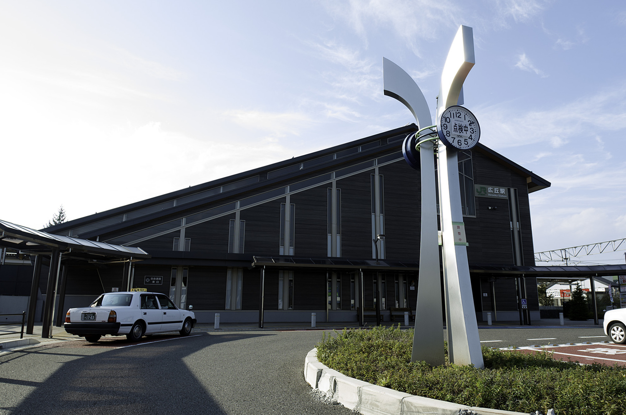 東日本旅客鉄道株式会社篠ノ井線広丘駅駅舎